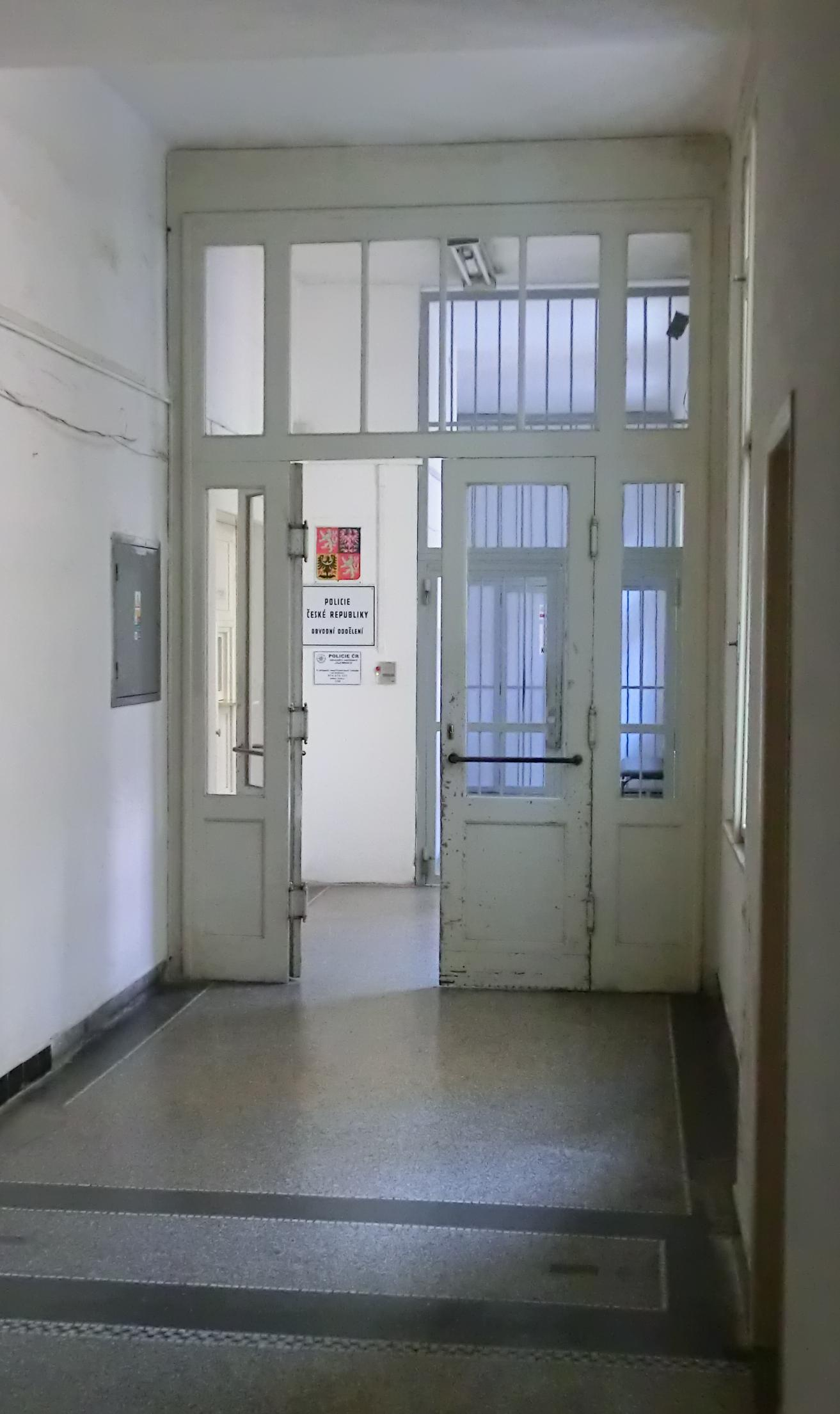 Budova pošty (bývalého Okresního soudu) v Jilemnici - příchod k policejní služebně